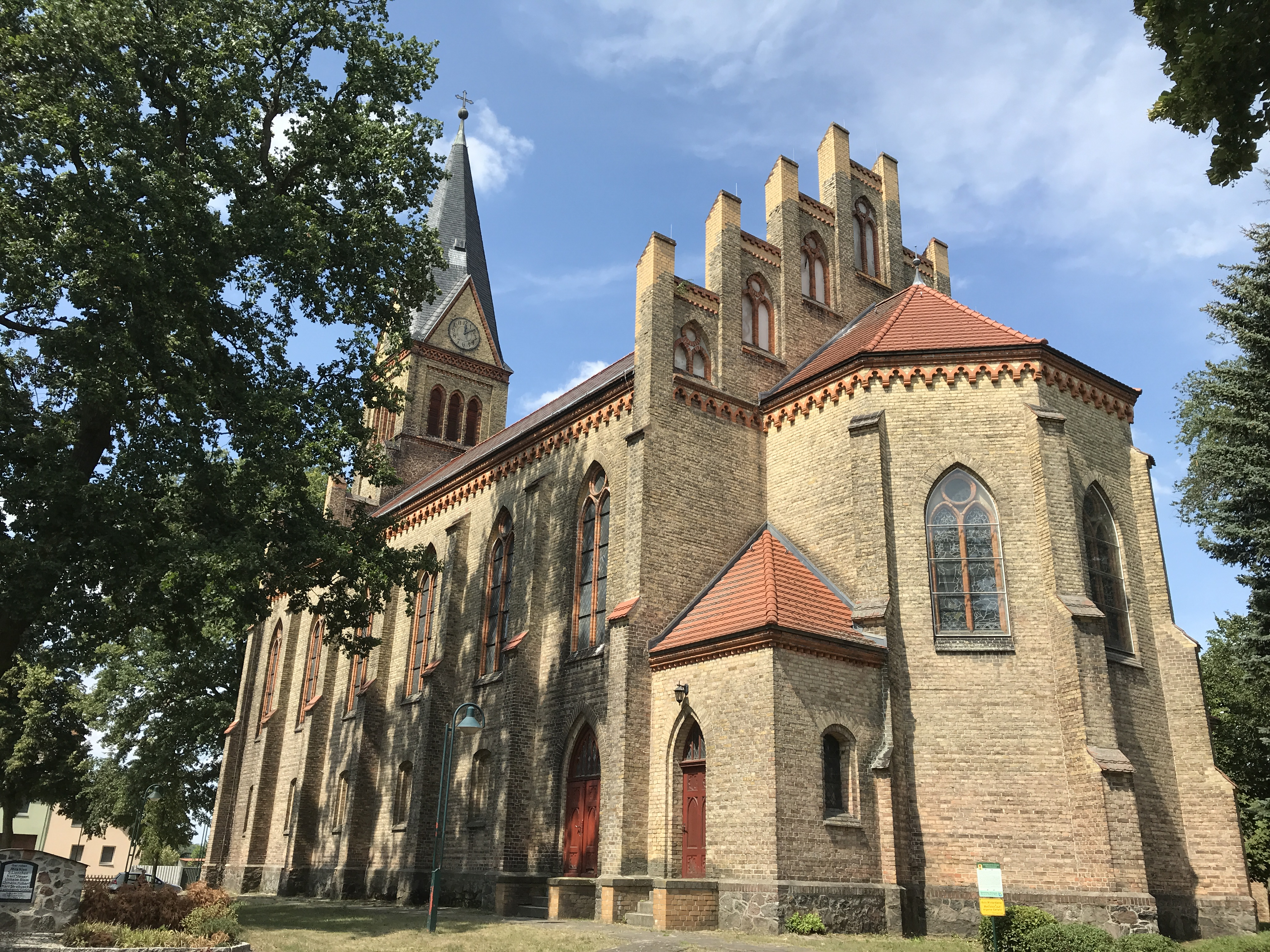 Die Dorfkirche Friedersdorf ist eine neugotische Saalkirche aus den Jahren 1878 bis 1880 in der Gemeinde Heidesee im Landkreis Dahme-Spreewald im Land Brandenburg